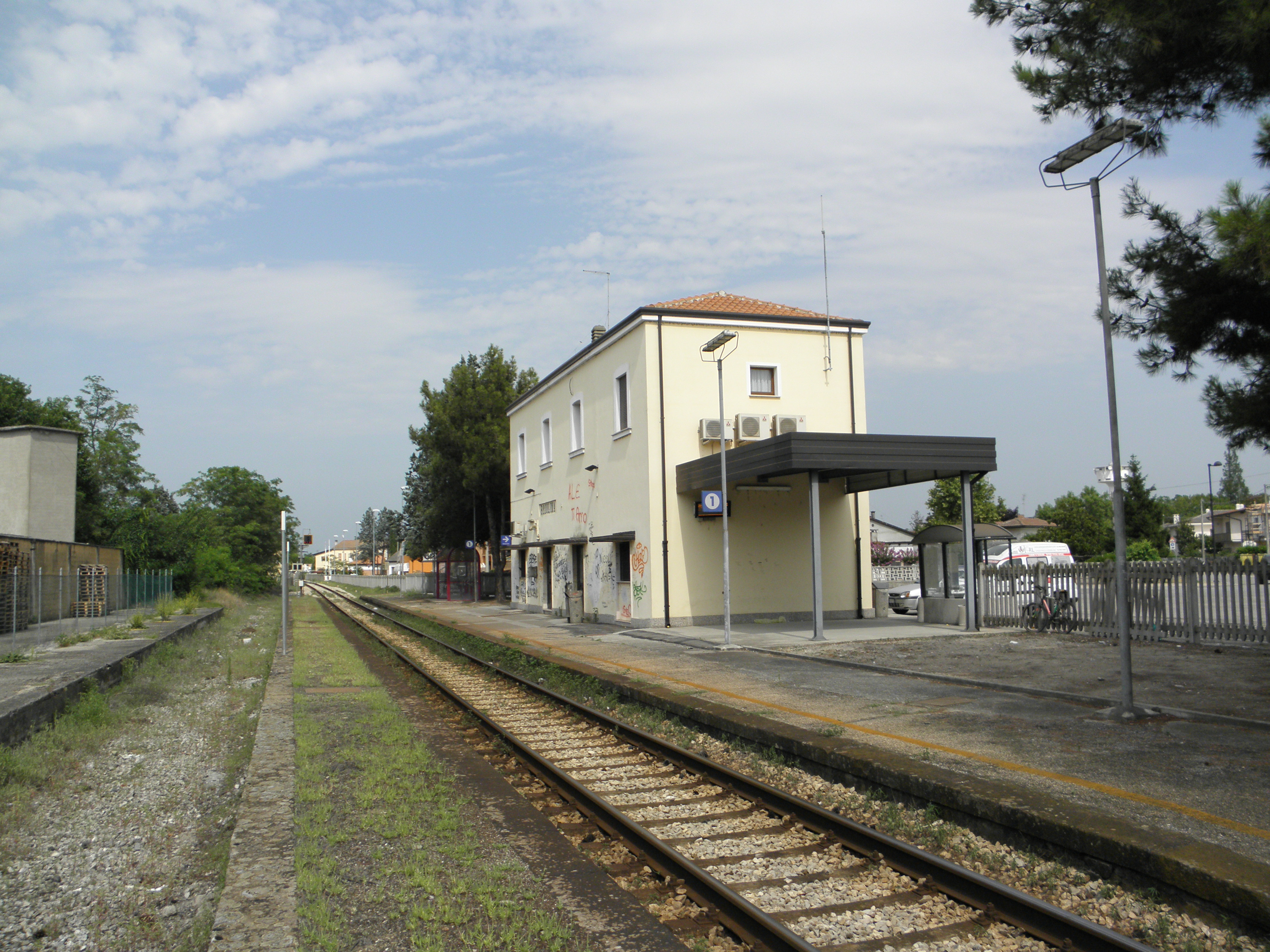 Rosolina, la stazione ferroviaria: il fabbricato viaggiatori e sulla sinistra il tratto della massicciata dove passava il secondo binario.